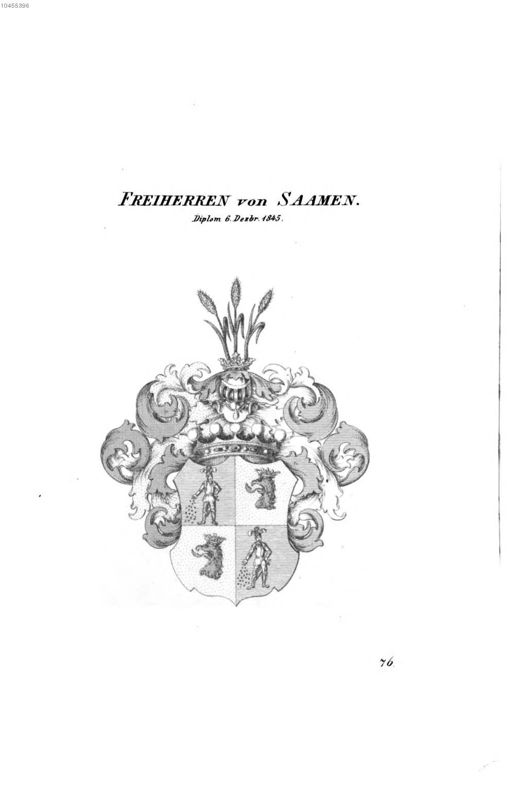 Wappen Saamen - Tyroff HA.jpg